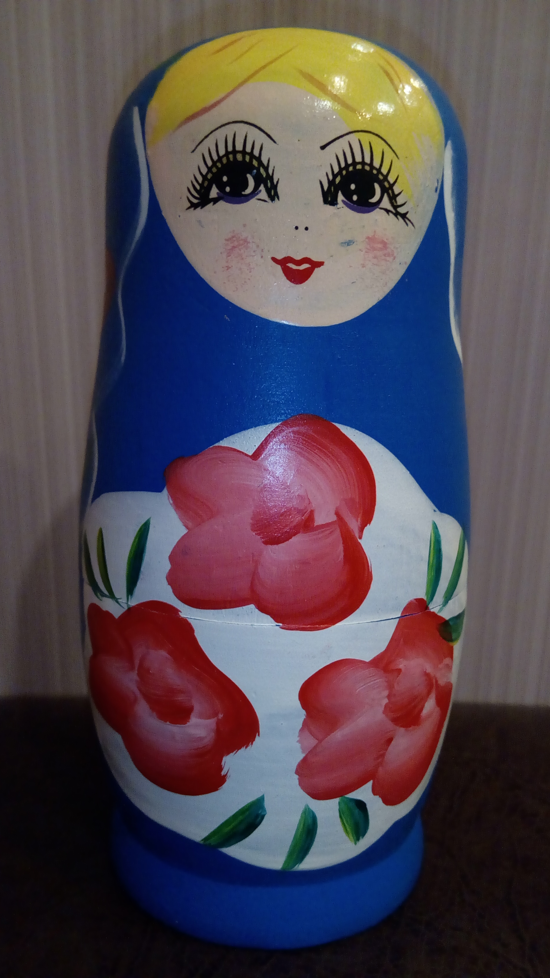 Rusiyanın simvolu: Matryoşka / Matroşka / Matruşka